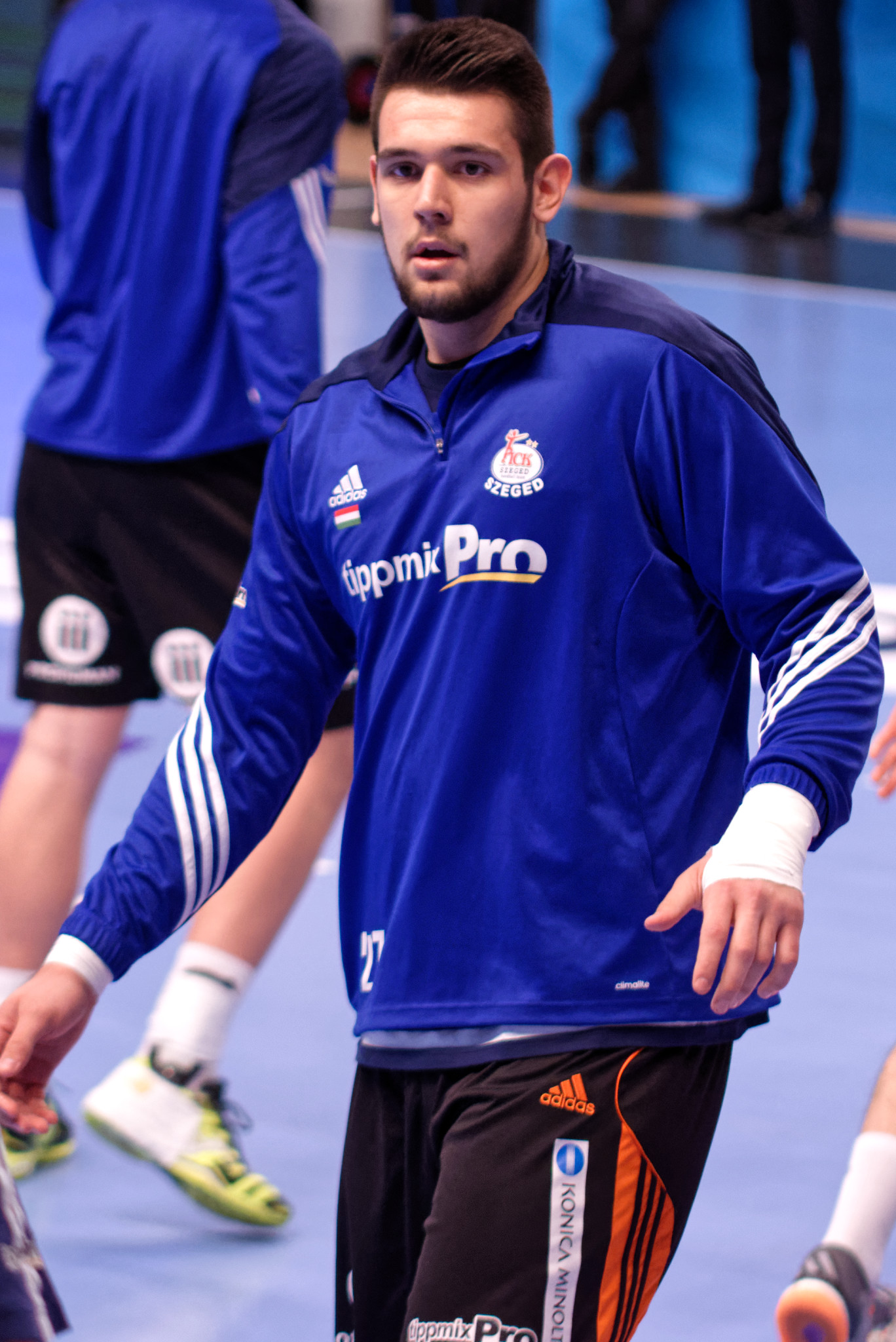 Rencontre de quart de finale de la ligue des champions 2016-17 entre le PSG et Pick Szeged. A Coubertin, le 29 avril 2017.